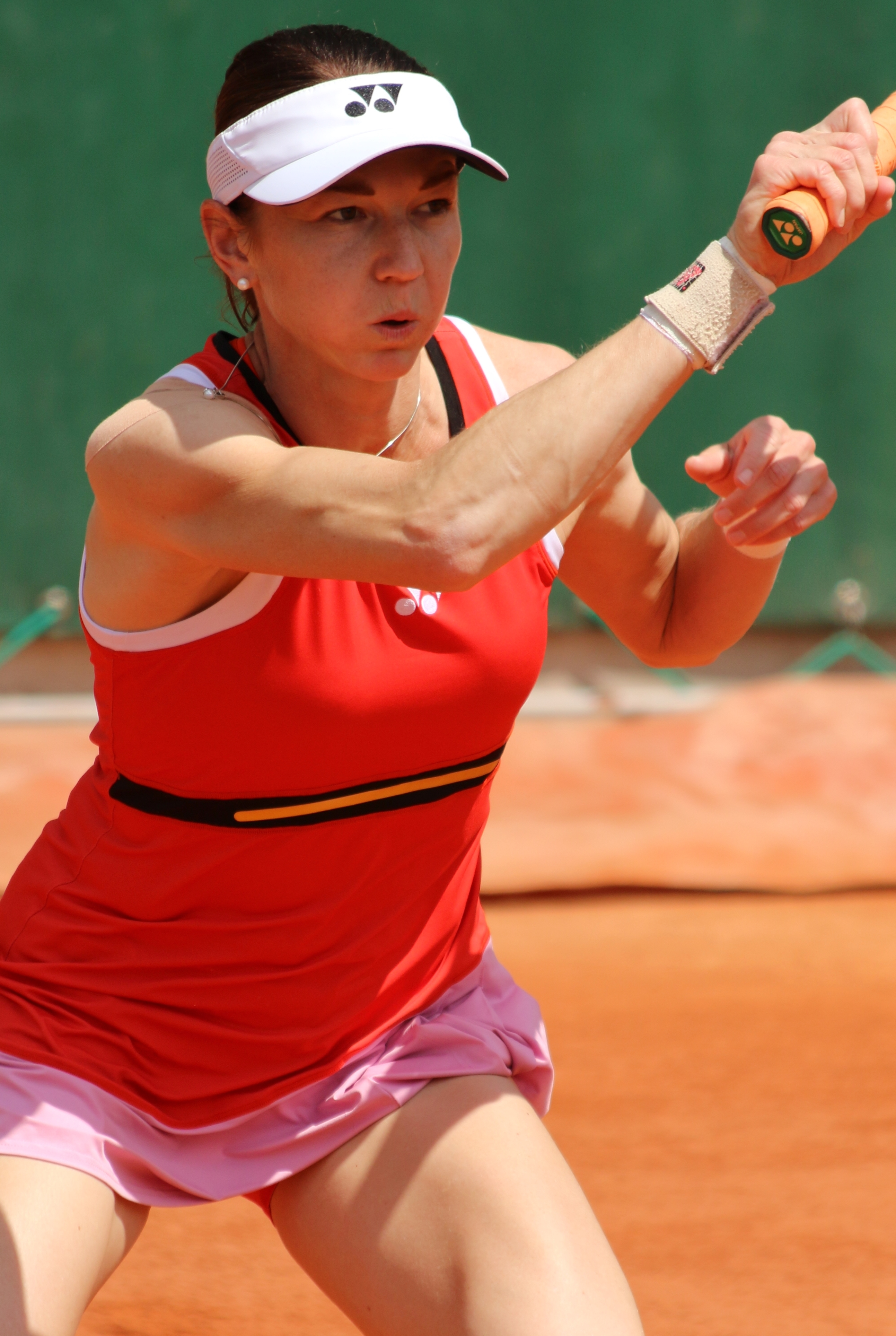 Voracova RG19 (13)